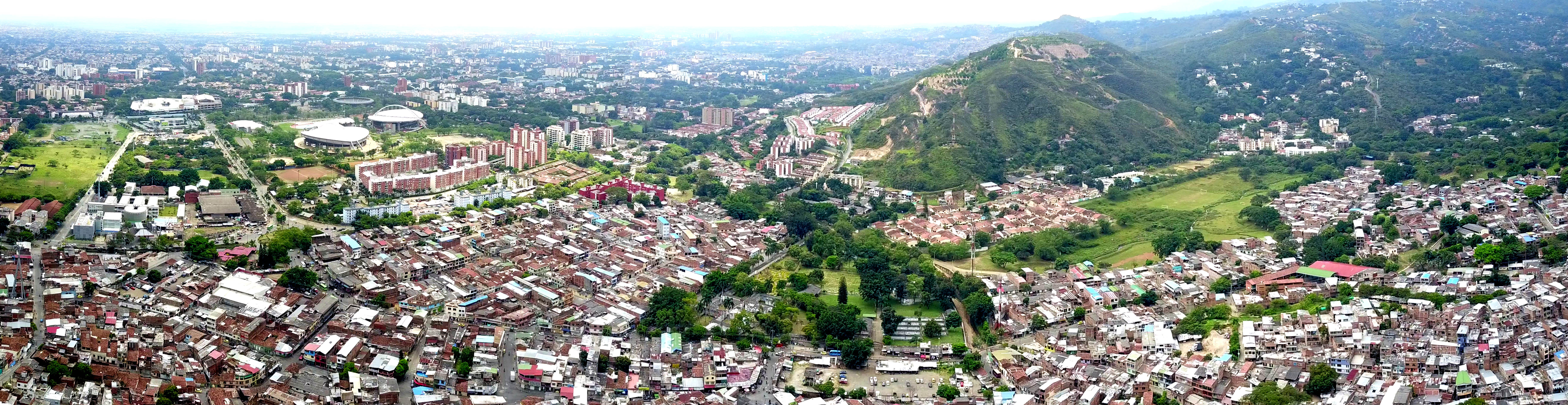 Panorámica - Cali - Valle del Cauca - Colombia